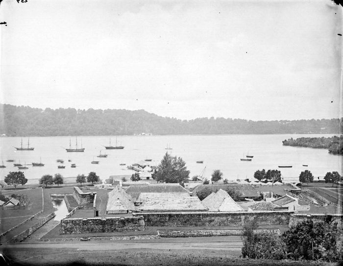 Negatief. Bovenaanzicht van Fort Nassau, Bandainaira